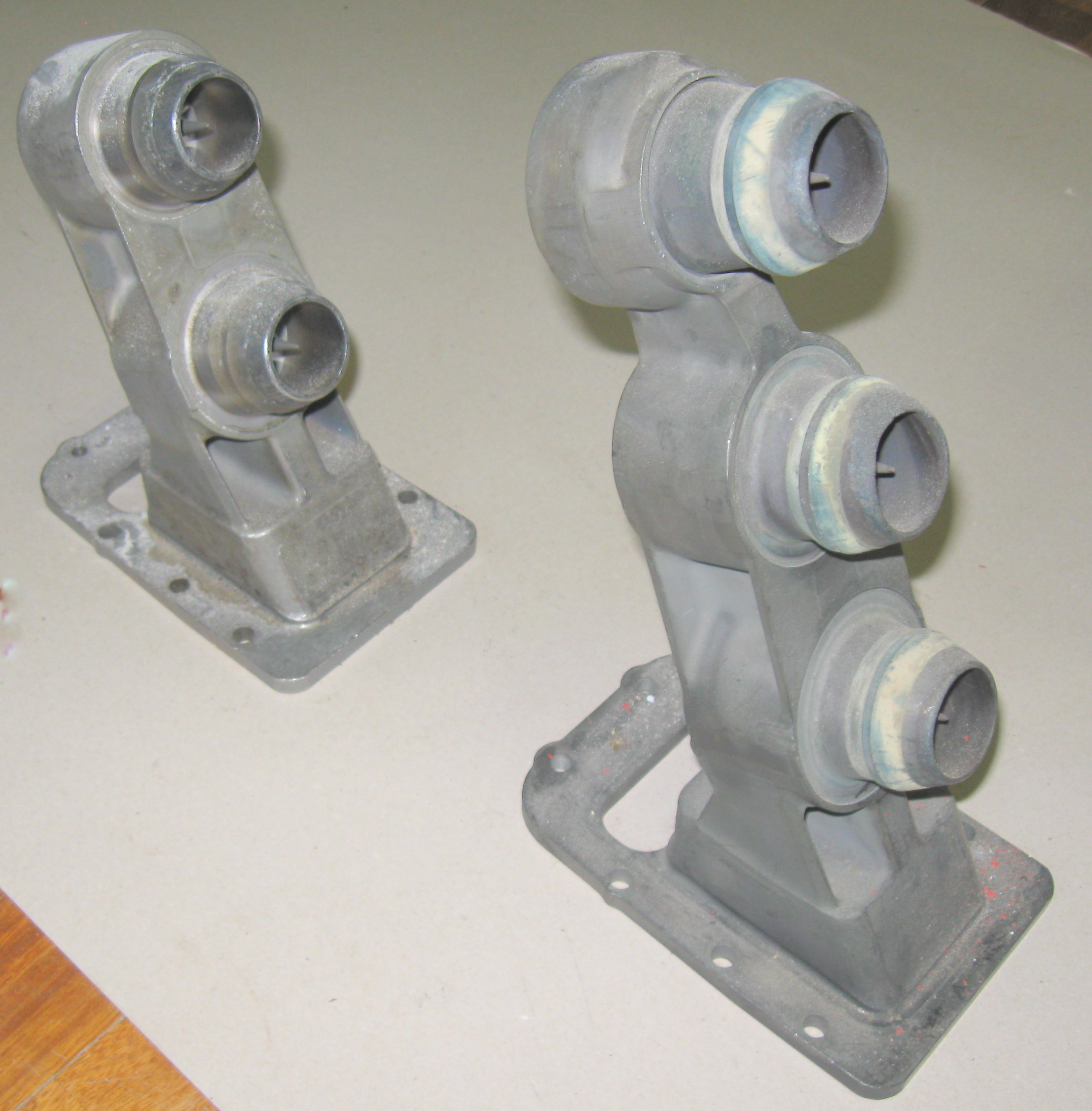 Premixing gas fuel nozzle of gas turbine